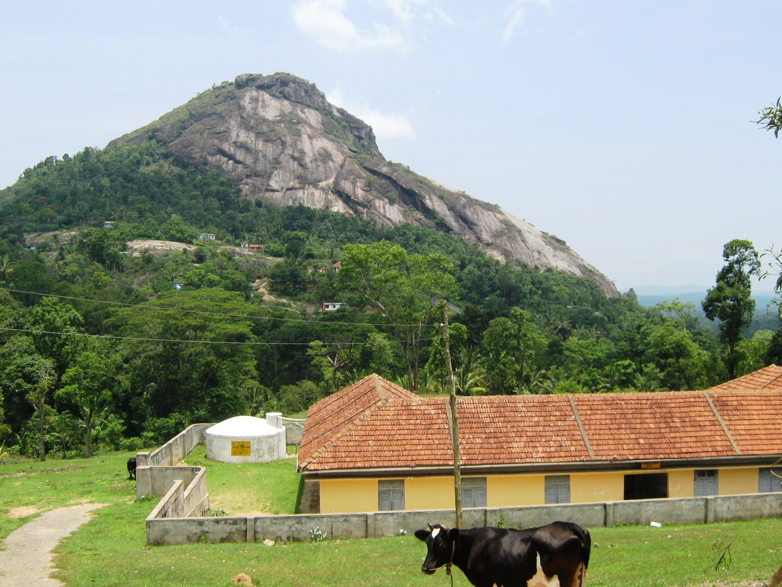 Wayanad, Kerala, India.